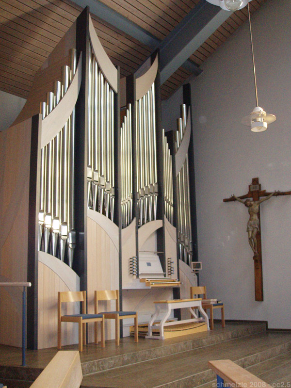 Orgel in Katholischer Pfarrkirche Heilig Kreuz im Kreuzgrund in Heilbronn-Böckingen